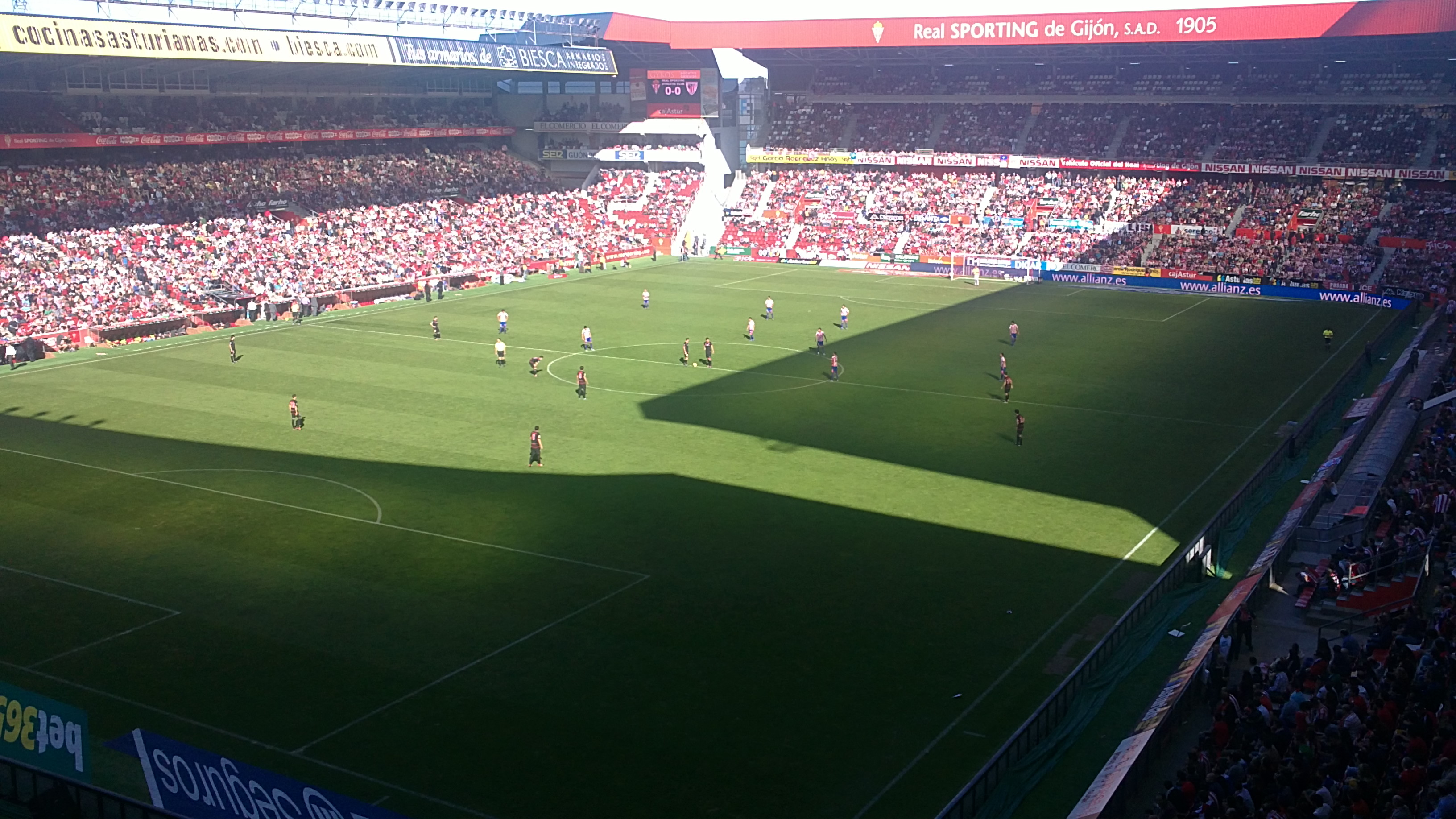 Estadio El Molinón casi lleno durante un Sporting-Athletic de 2011